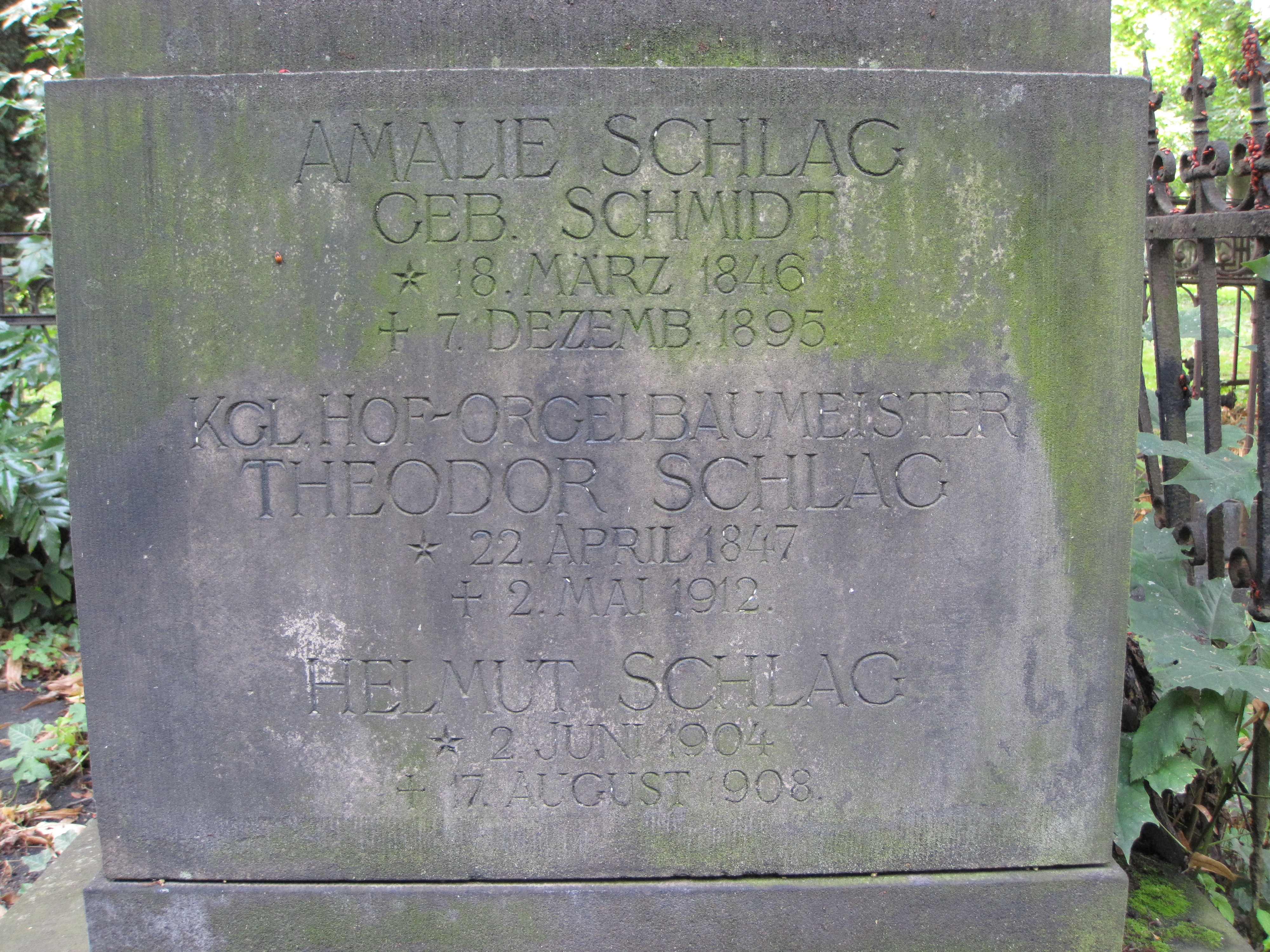 Grabstein Theodor Schlag in Schweidnitz